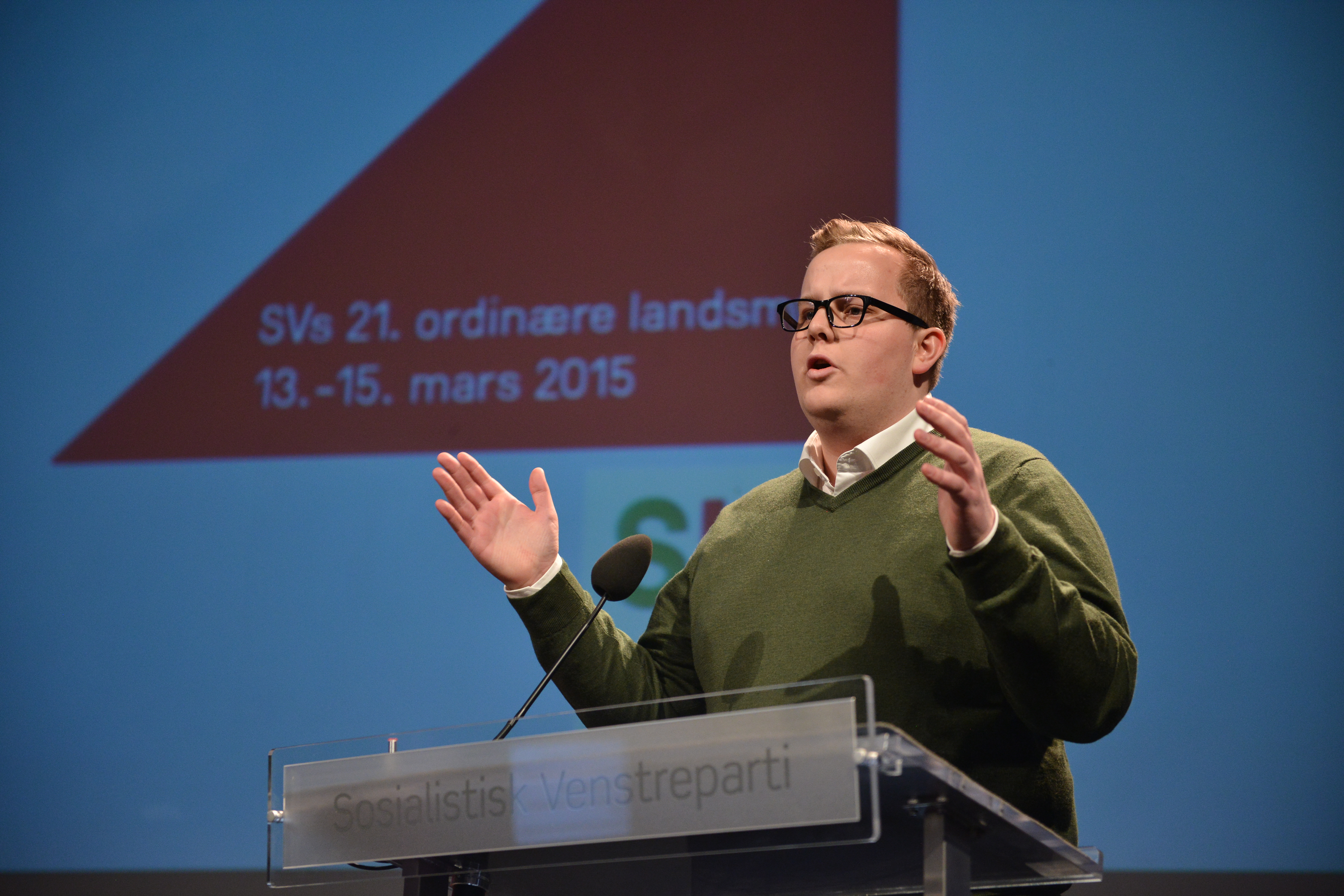 Eirik Faret Sakariassen under SVs landsmøte 2015